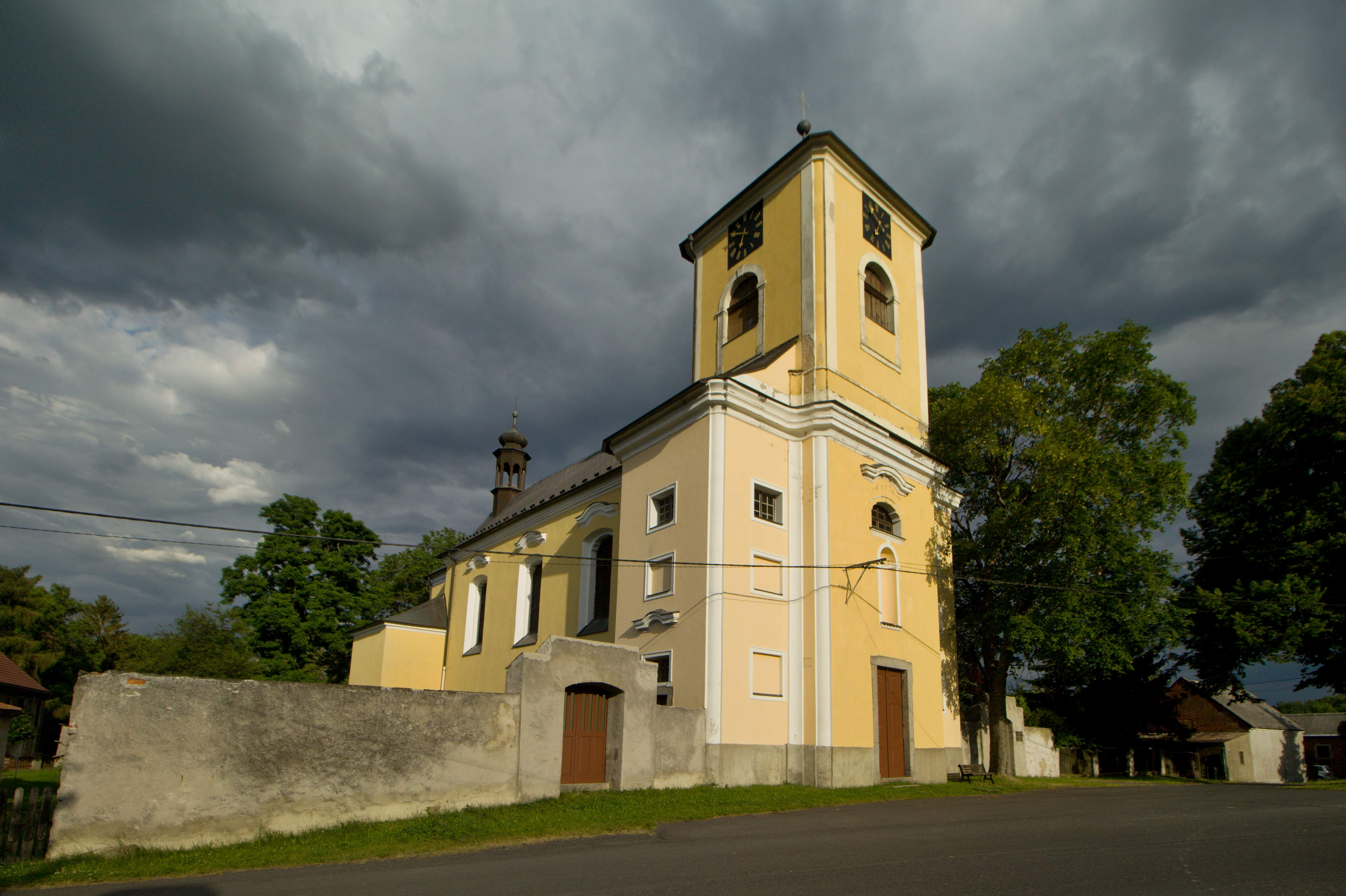 Bochov-Údrč